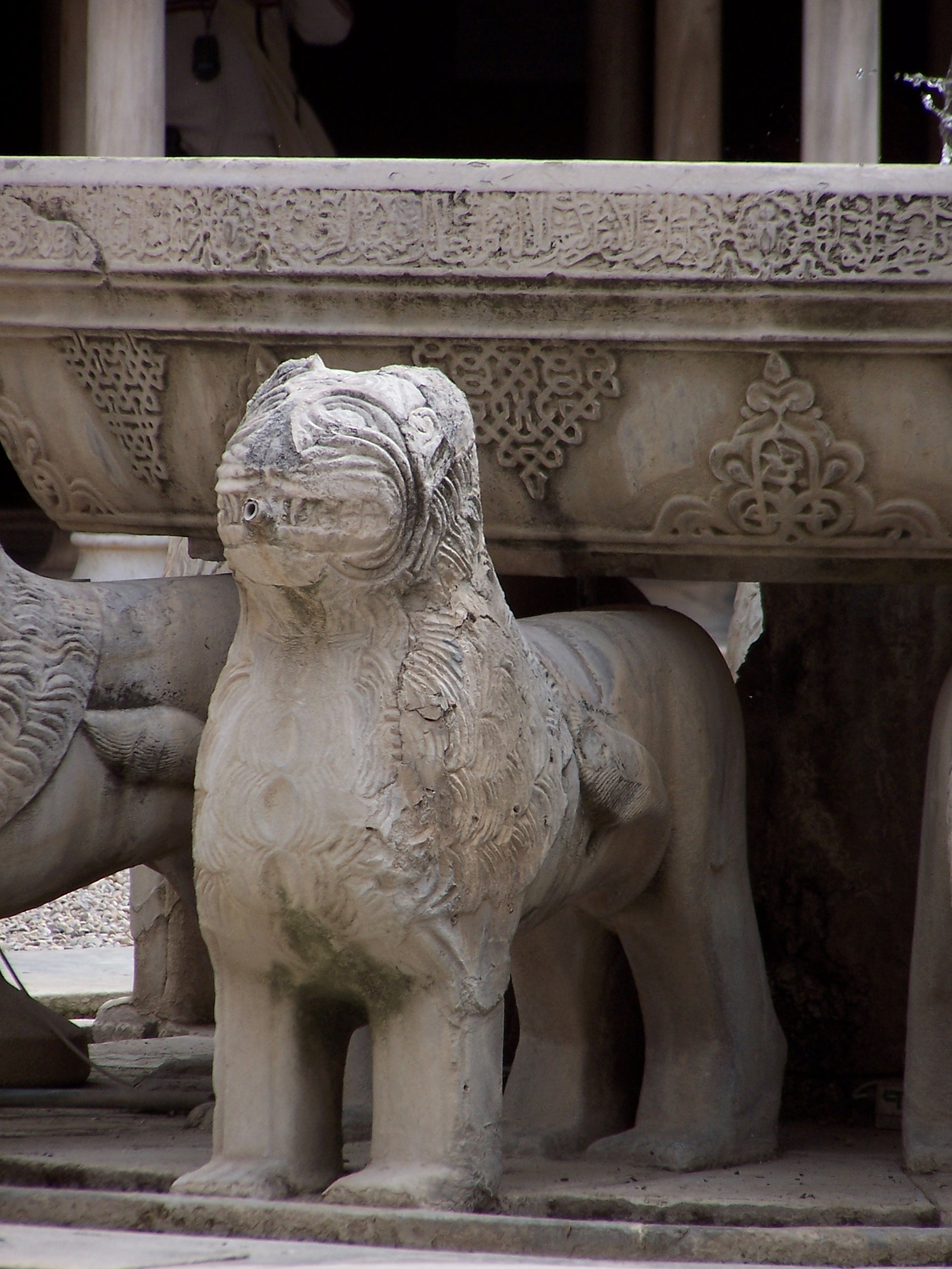 Detalle de uno de los leones que forma la fuente de los Leones situada en el patio con el mismo nombre. Alhambra, Granada, España. Notas: Se aprecia una elevada erosión en los leones.